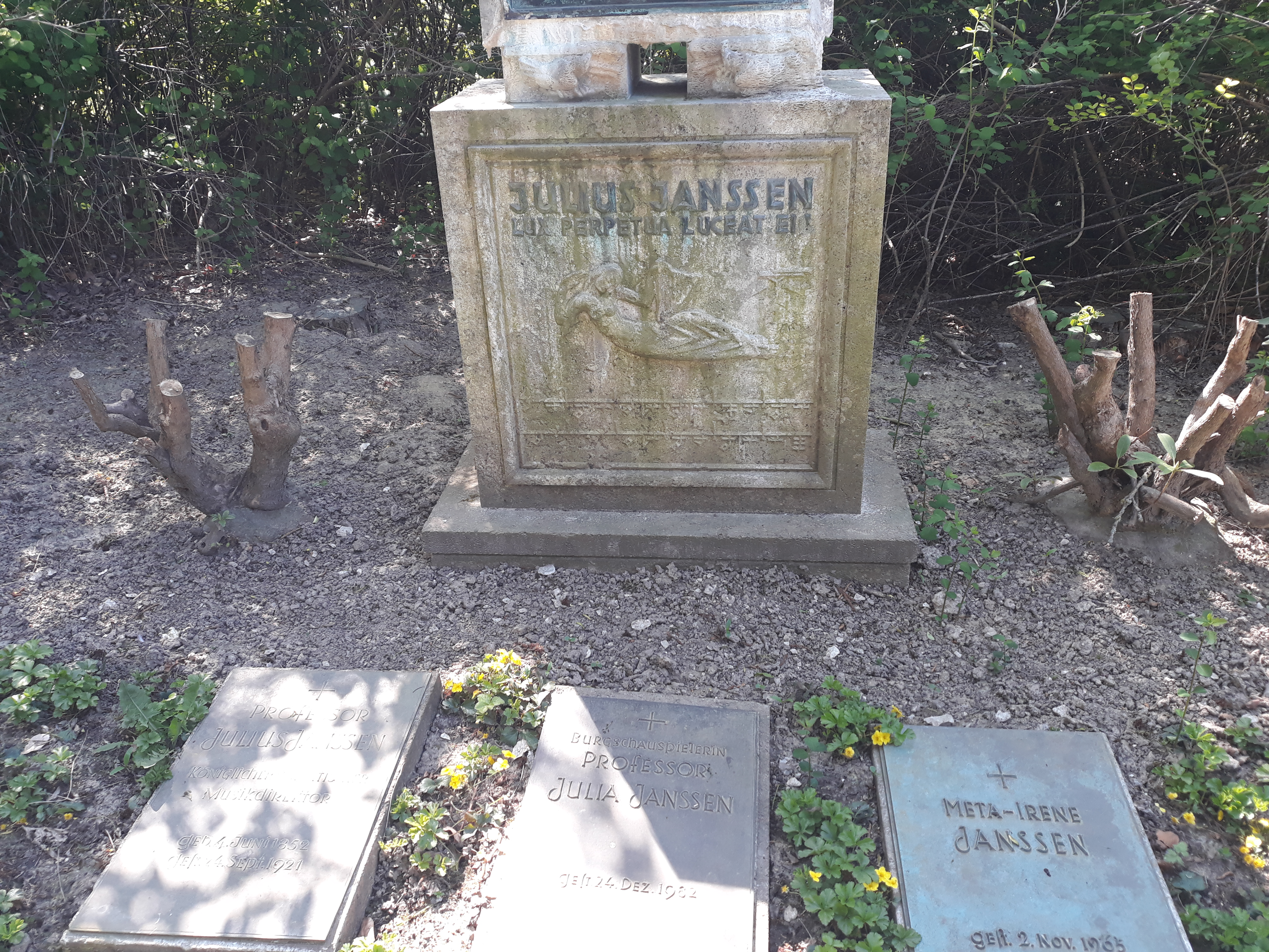 Das Grab der Schauspielerin Julia Janssen (Burgtheater Wien) im Familiengrab (darunter ihr Vater Musikdirektor Julius Janssen) auf dem Hauptfriedhof Dortmund.